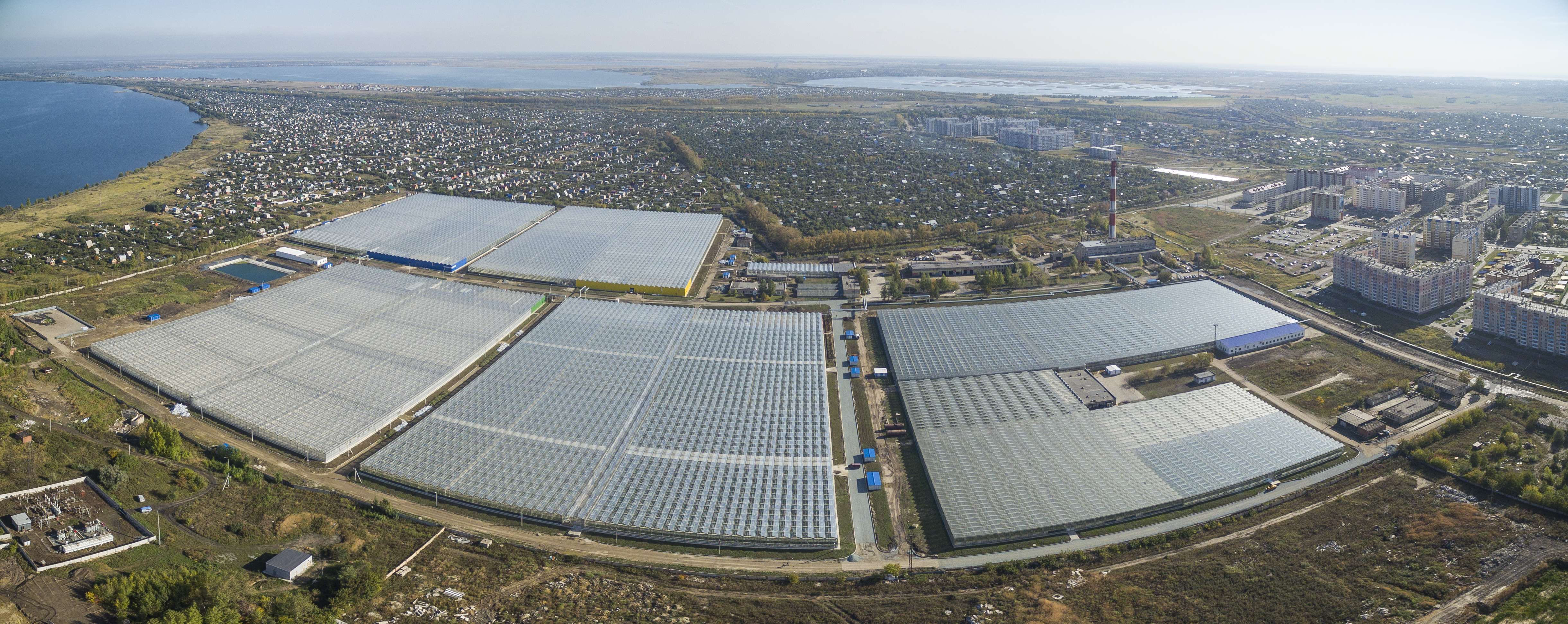 Производственная площадка Агрокомплекса "Чурилово", 25 га, г. Челябинск